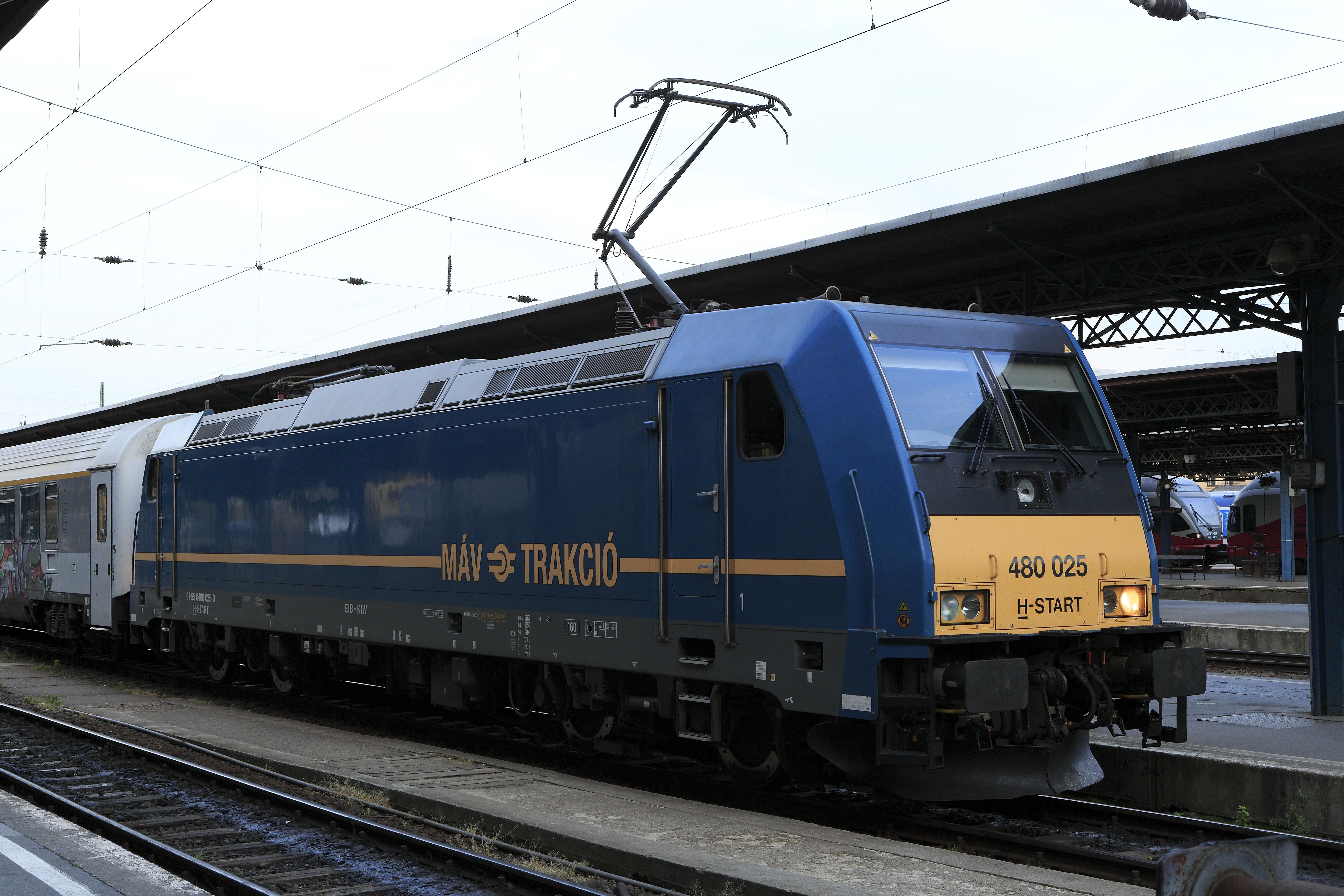 Die 480 025 übernahm den 342 von Beograd in Subotica. Der »internationale Schnellzug« ist in Ungarn nur ein besserer Personenzug mit 19 (!) Verkehrshalten.